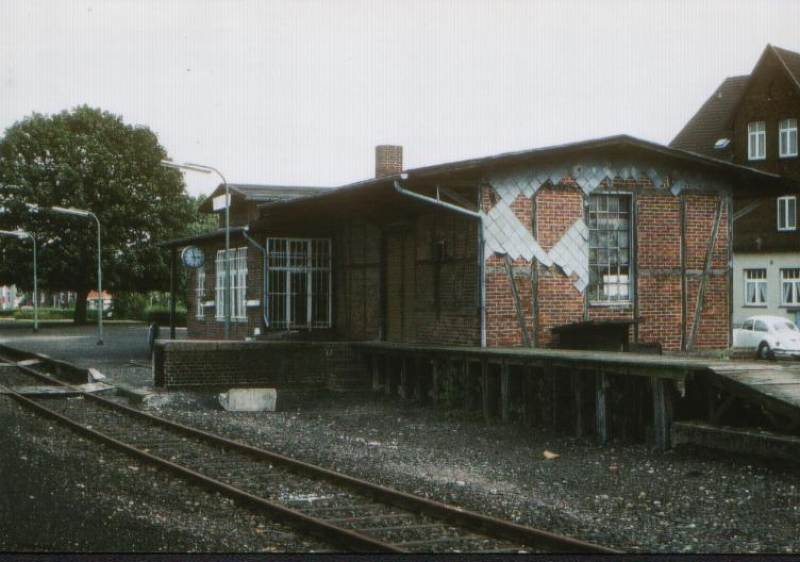 Das Bahnhofsgebäude von Groß Berkel (Lk Hameln-Pyrmont), an der Bahstreke Hameln-Lage (Begatalbahn). Gleisseite 1980. Foto: R.Maritschnigg